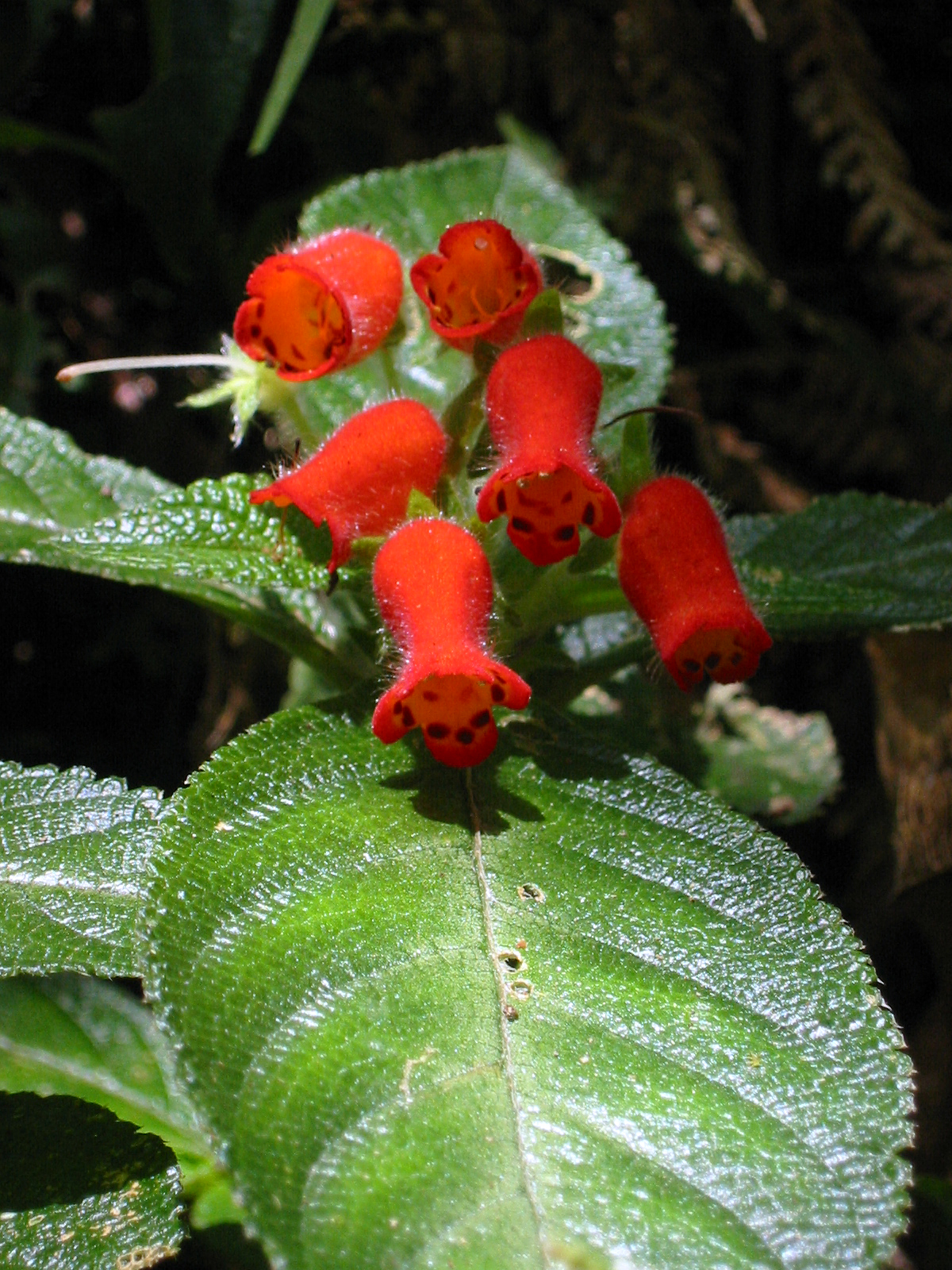 Pearcea intermedia, species from Ecuador